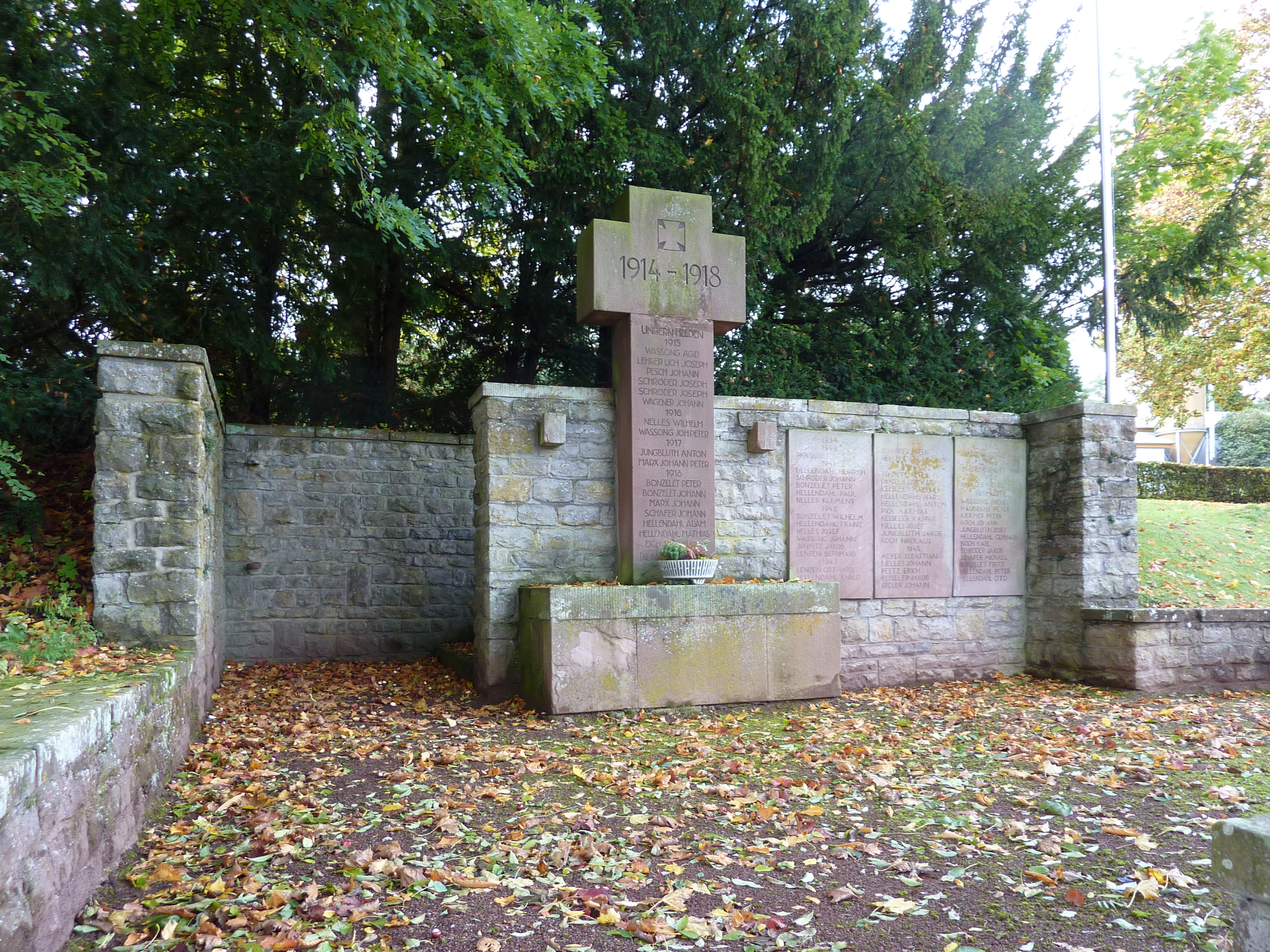 Uedelhoven, Kreuzstr. gegenüber Nr. 5, Kriegerdenkmal 1